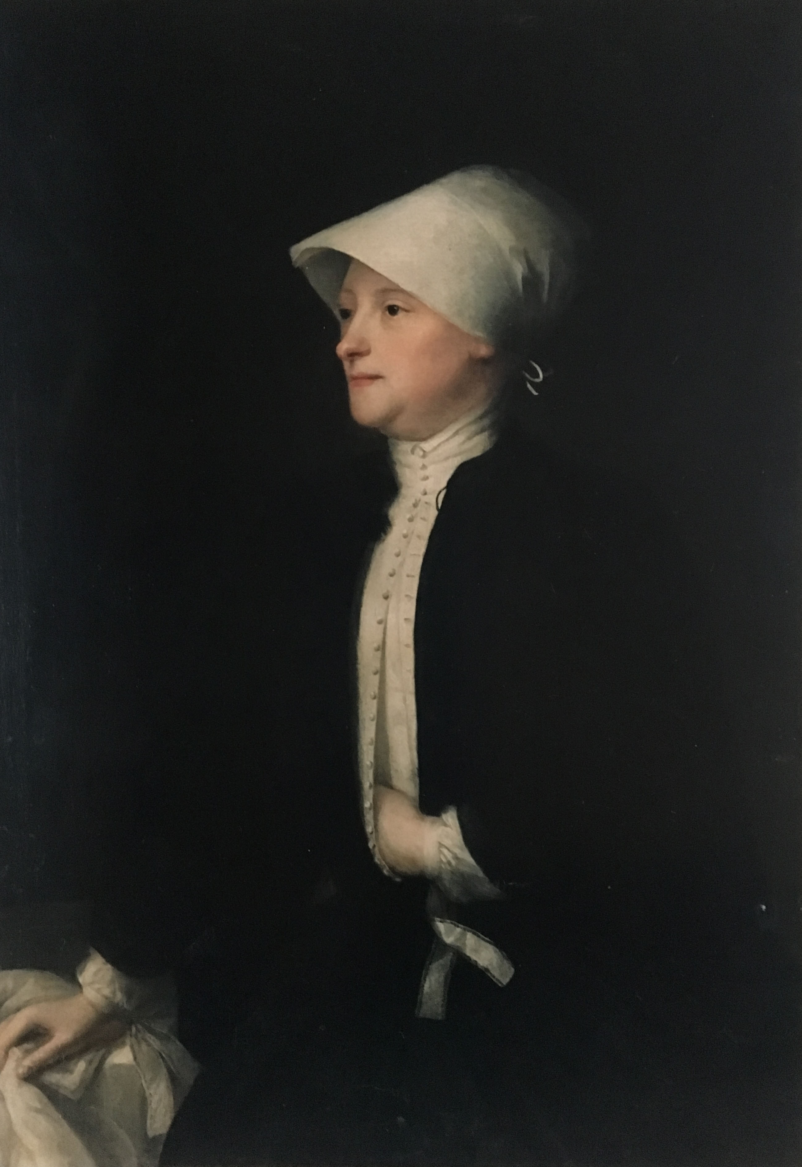 Brita Kristina Appelbom